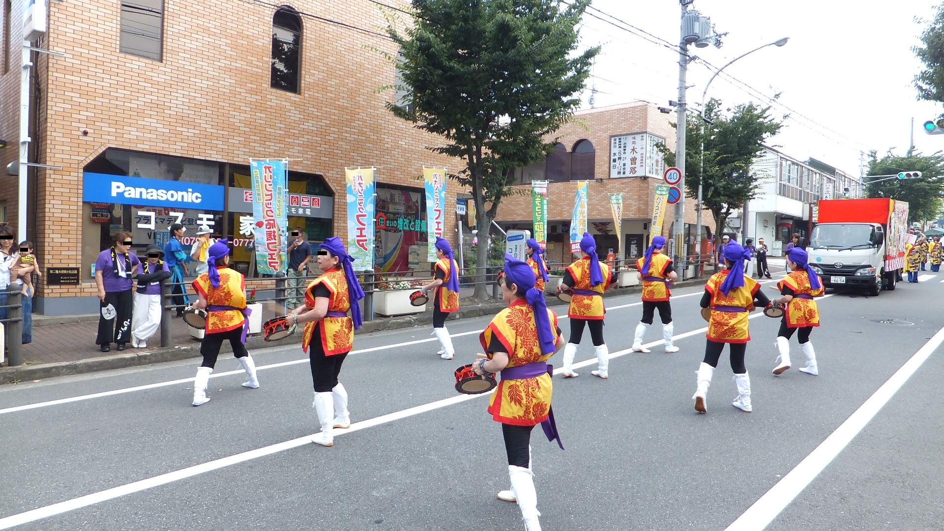 三木さんさん祭り 踊り子